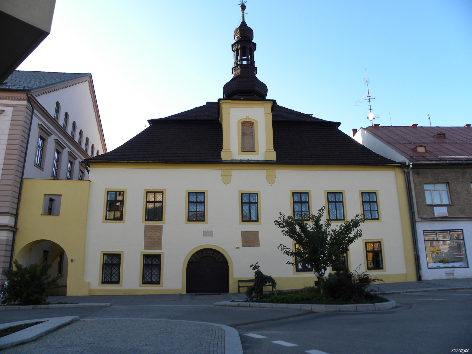 NOVÉ MĚSTO na Moravě - Stará radnice - nyní Museum